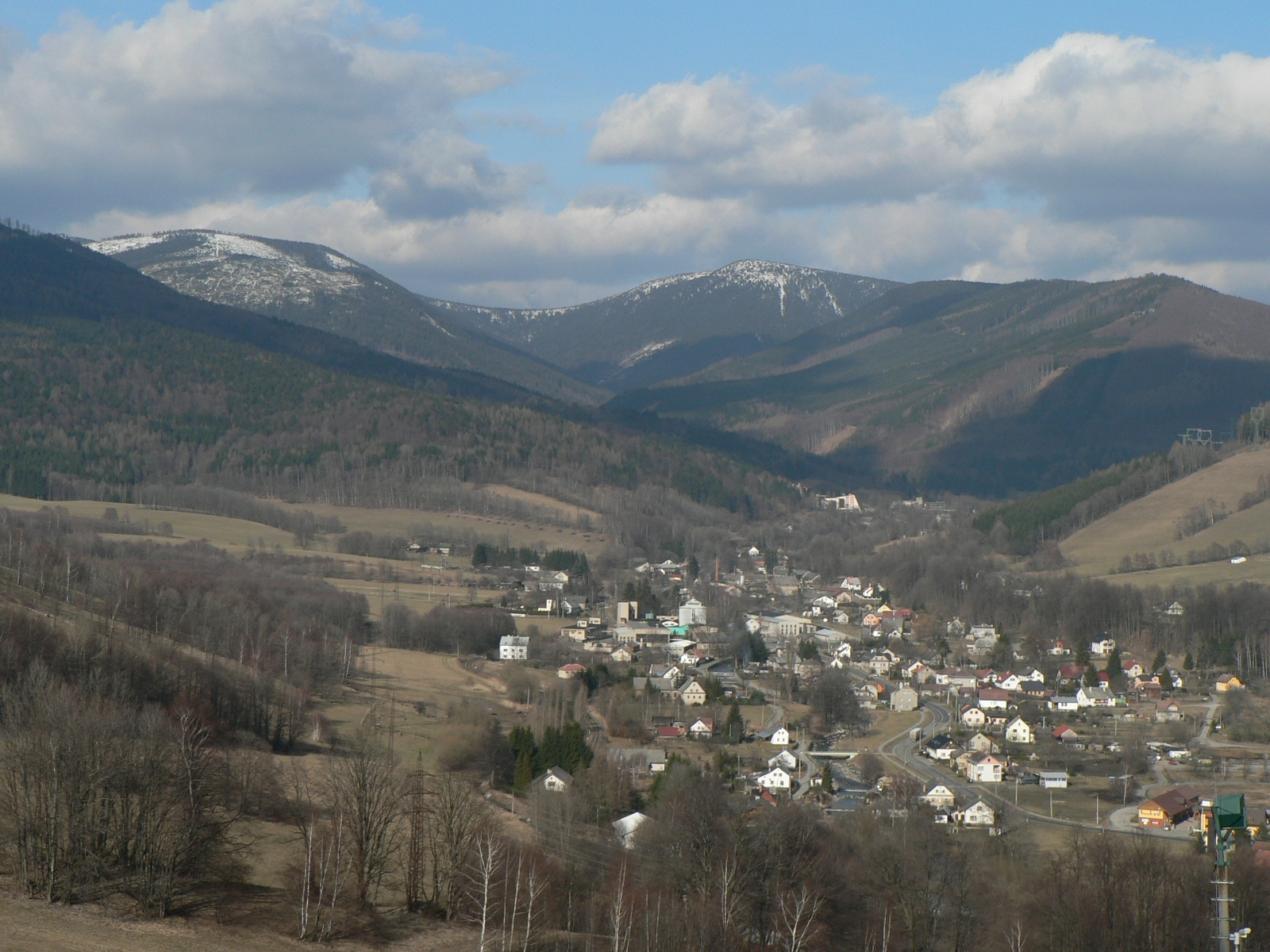 Horní Loučná nad Desnou, v pozadí vlevo Spálený vrch (za ním se skrývá Vozka), vpravo Červená hora.